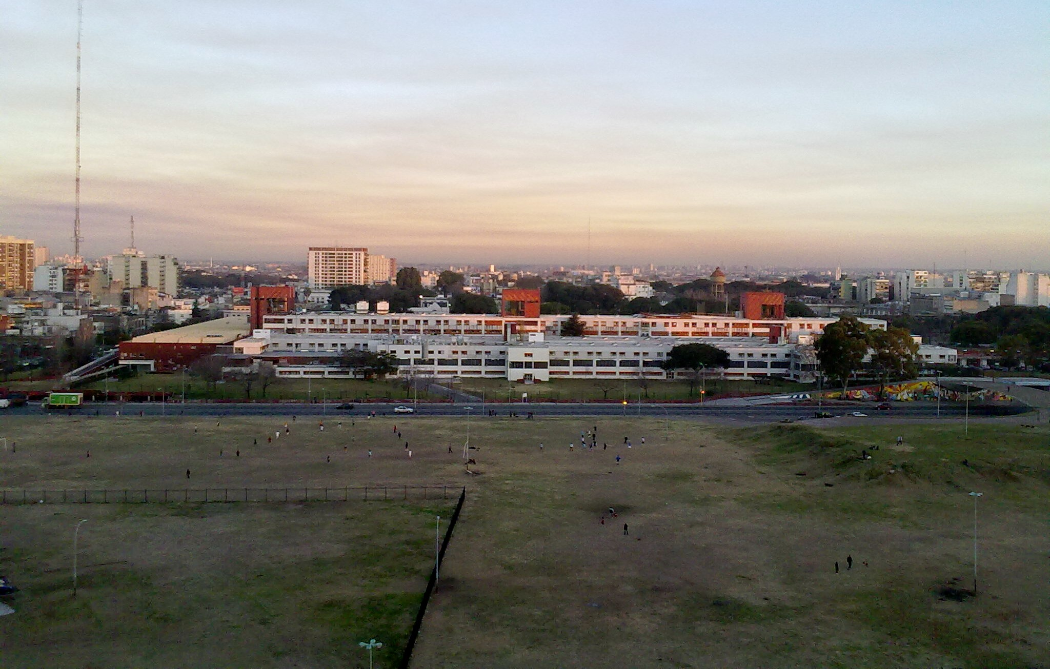 Hospital de Pediatría S.A.M.I.C. Prof. Dr. Juan P. Garrahan, Pichincha Nº 1890, Parque Patricios (Buenos Aires), Buenos Aires, Argentina. Vista desde Av Juan de Garay al 2000